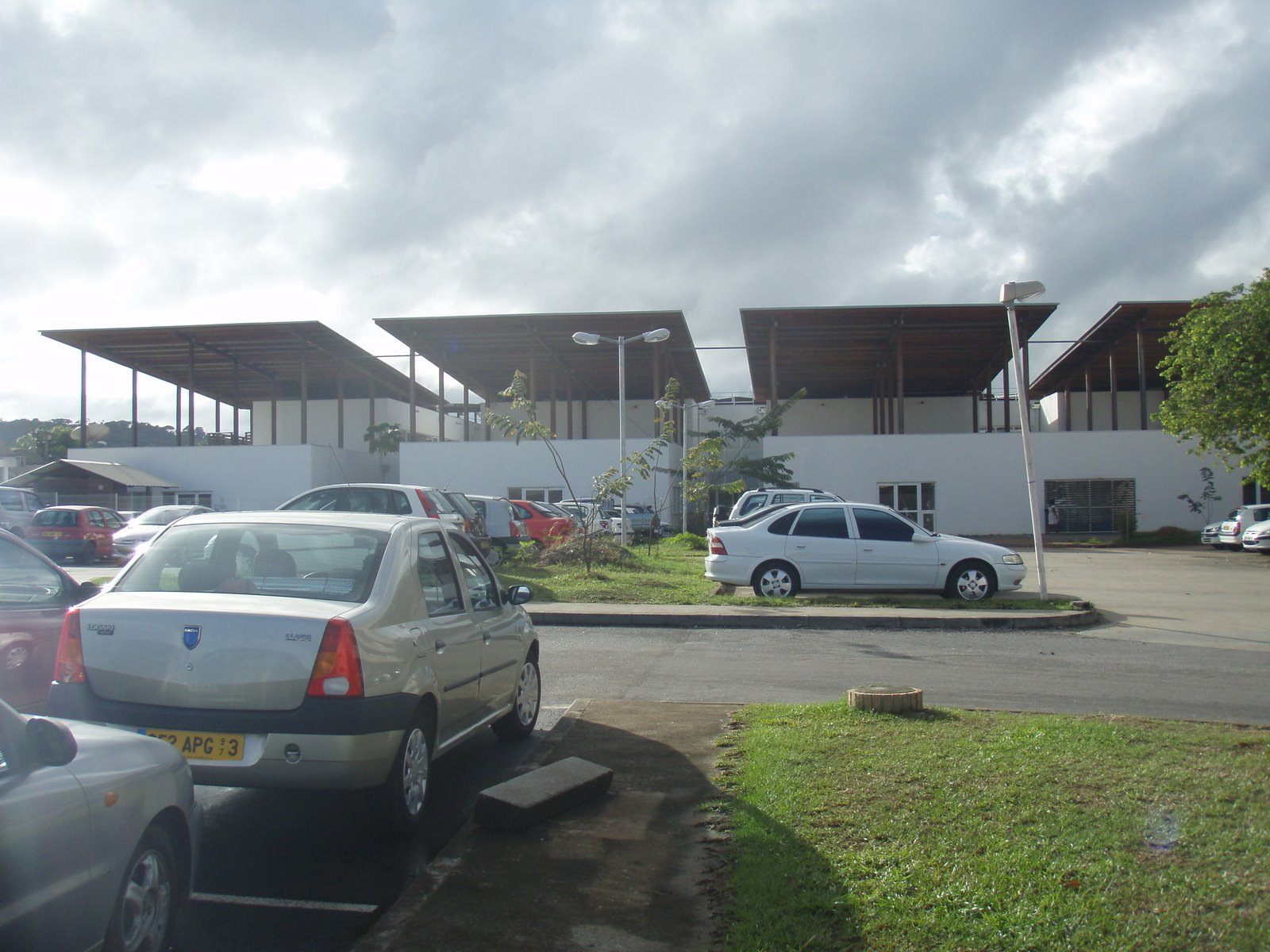 Bâtiment du service des Urgences